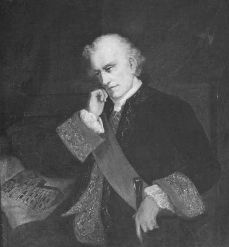 Ambrosio de Benavides (1718 - †1787) brigadier español designado por el rey Carlos III de España como gobernador del Reino de Chile a la edad de 62 años, gracias a que ha demostrado en Charcas sus dotes administrativas, pero no obstante ello, llega debilitado física y moralmente a Chile, entregando el gobierno a los funcionarios más cercanos.